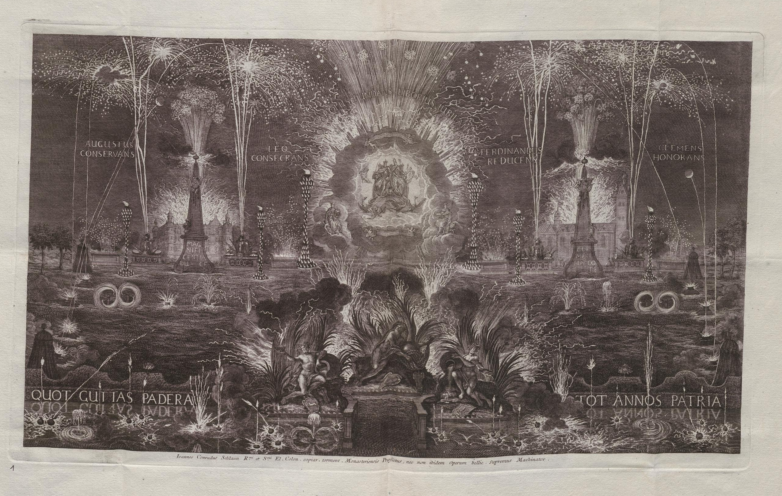 Grafik aus dem Klebeband Nr. 10 der Fürstlich Waldeckschen Hofbibliothek Arolsen Motiv: Feuerwerk zur 900-Jahr-Feier der Überführung der Reliquien des Hl. Liborius, in Paderborn 1736